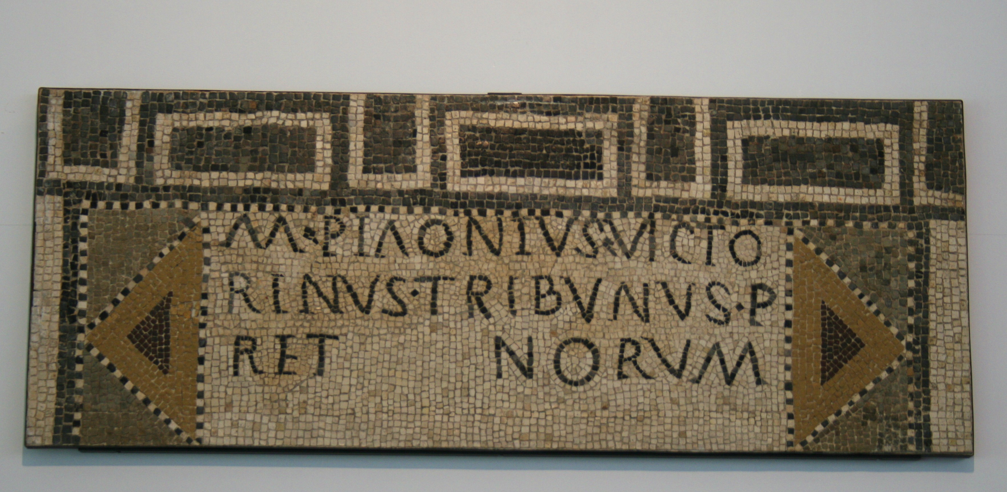 Mosaik mit dem Namen des Victorinus (269-271 Kaiser des Gallischen Sonderreichs) aus dem Rheinischen Landesmuseum Trier CIL XIII, 03679 (4, p 43).